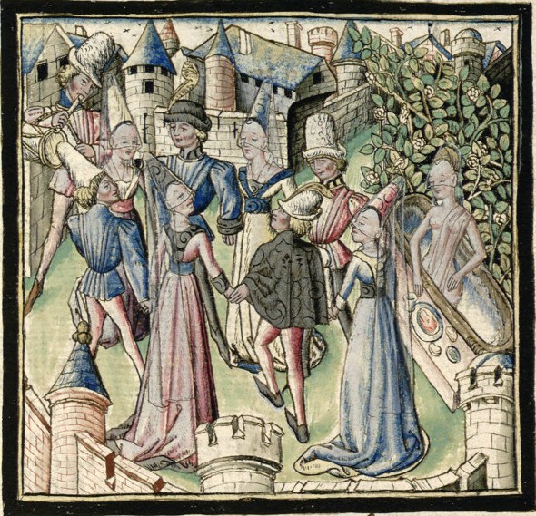 ChampionDesDames-Grenoble-Ms0352-f026r